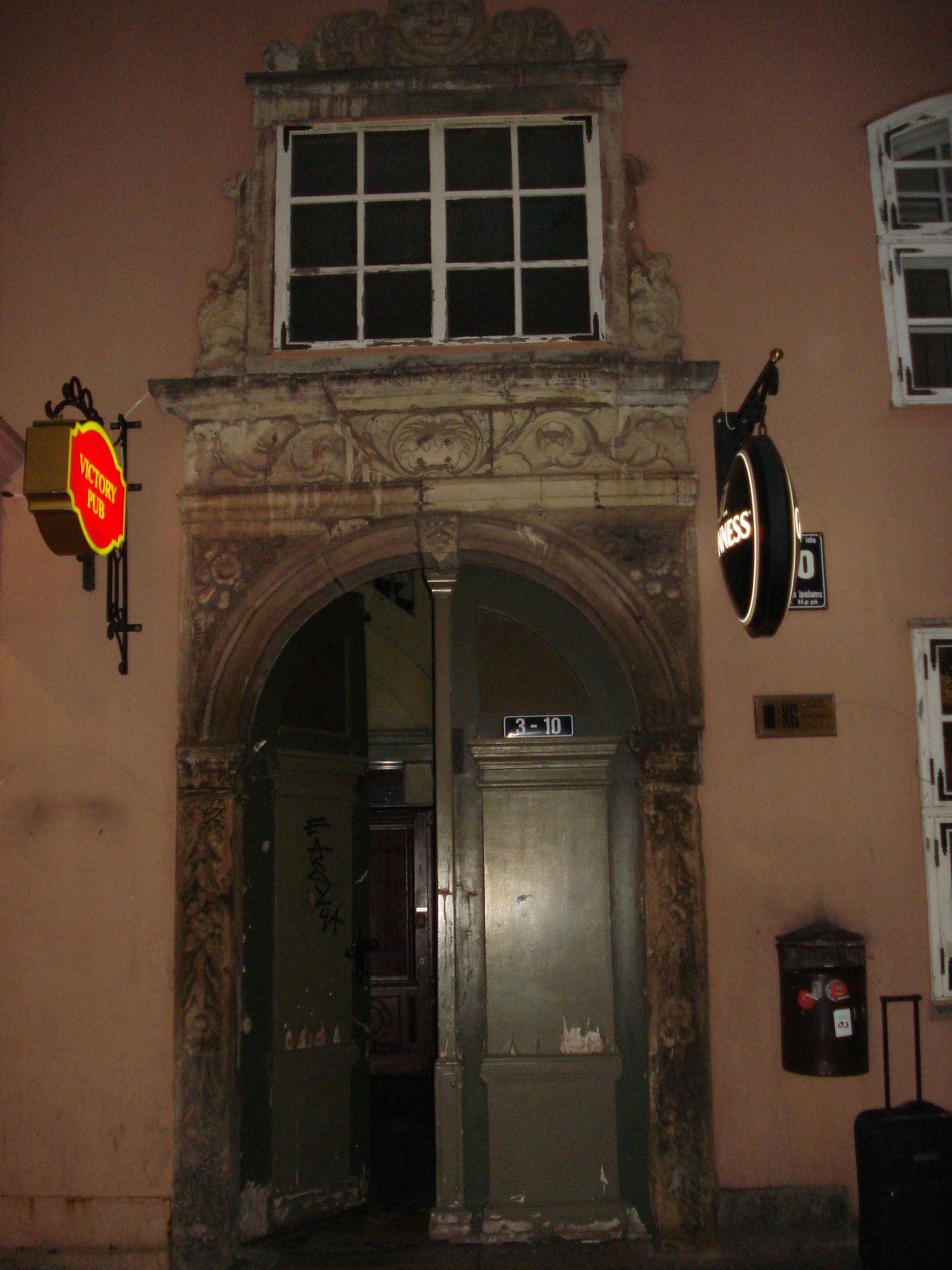 Old portal on Tirgoņu iela 10